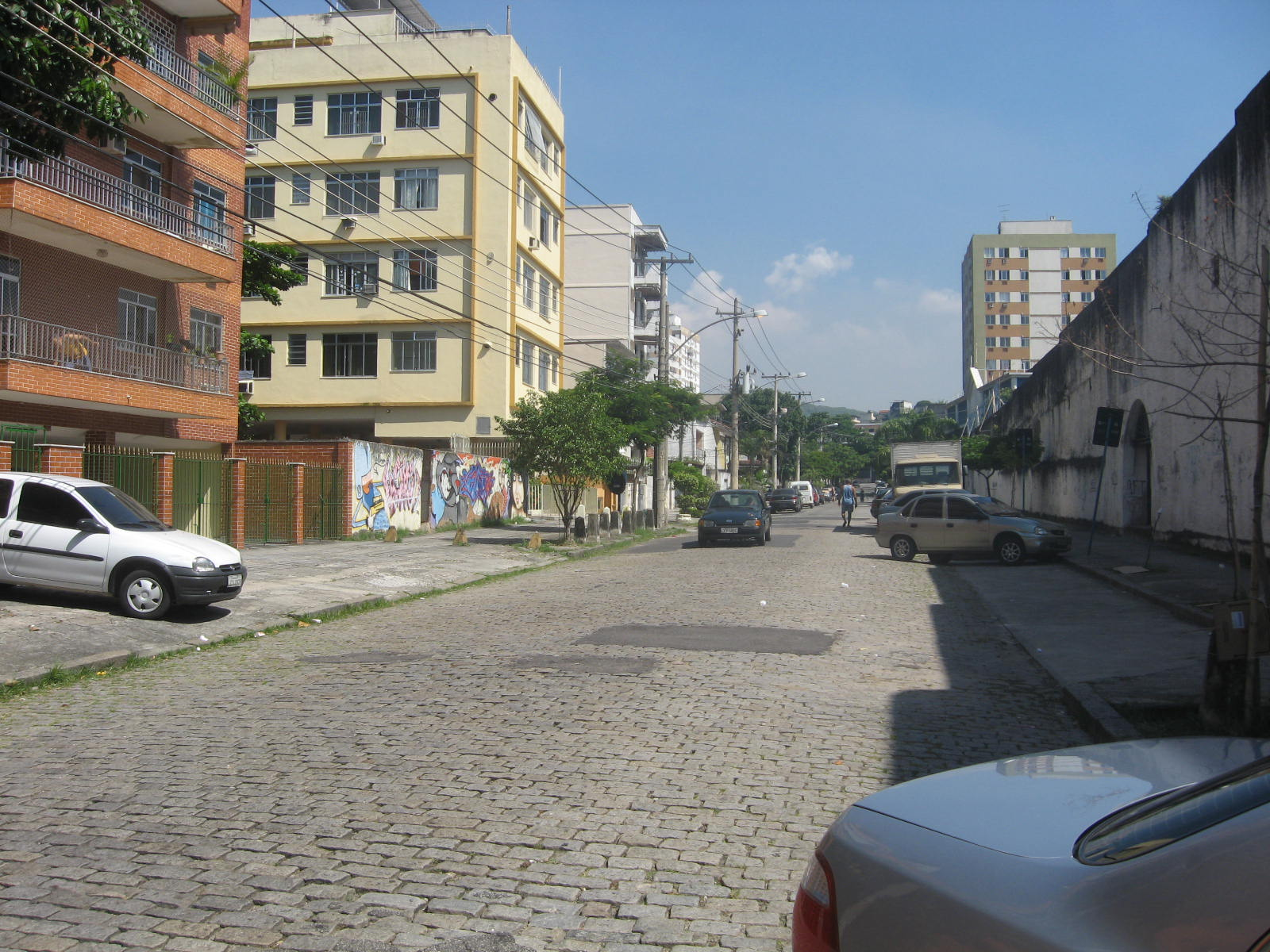 Bairro de Olaria, localizado na Zona Norte da cidade do Rio de Janeiro, RJ, Brasil.